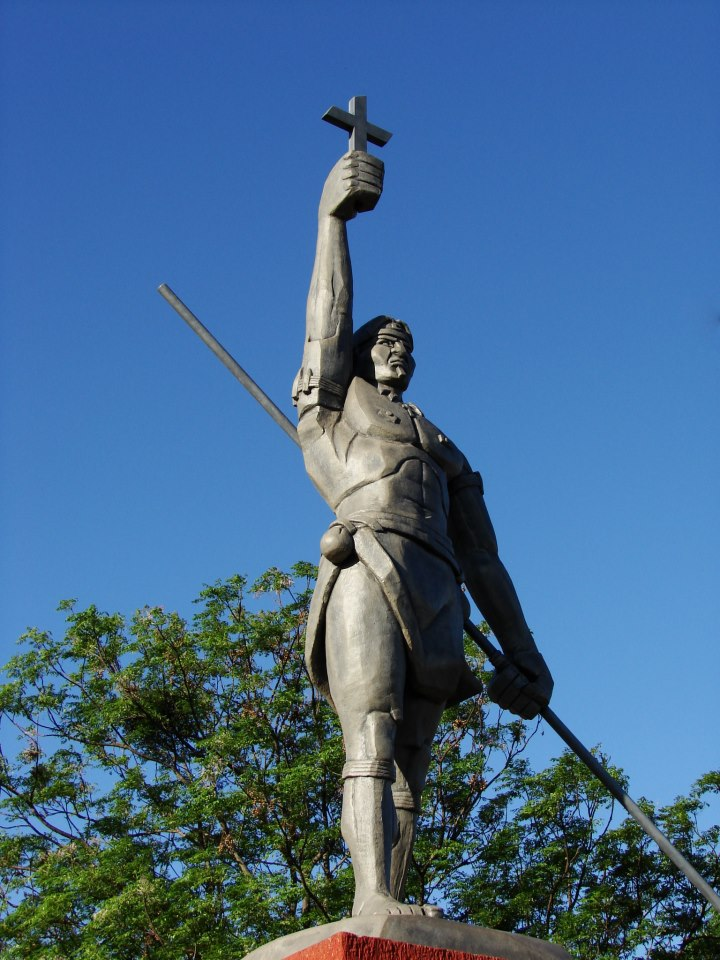 escultura em homenagem ao líder Sepé Tiaraju. Localizado na cidade de São Luiz Gonzaga, Missões, RS, Brasil.